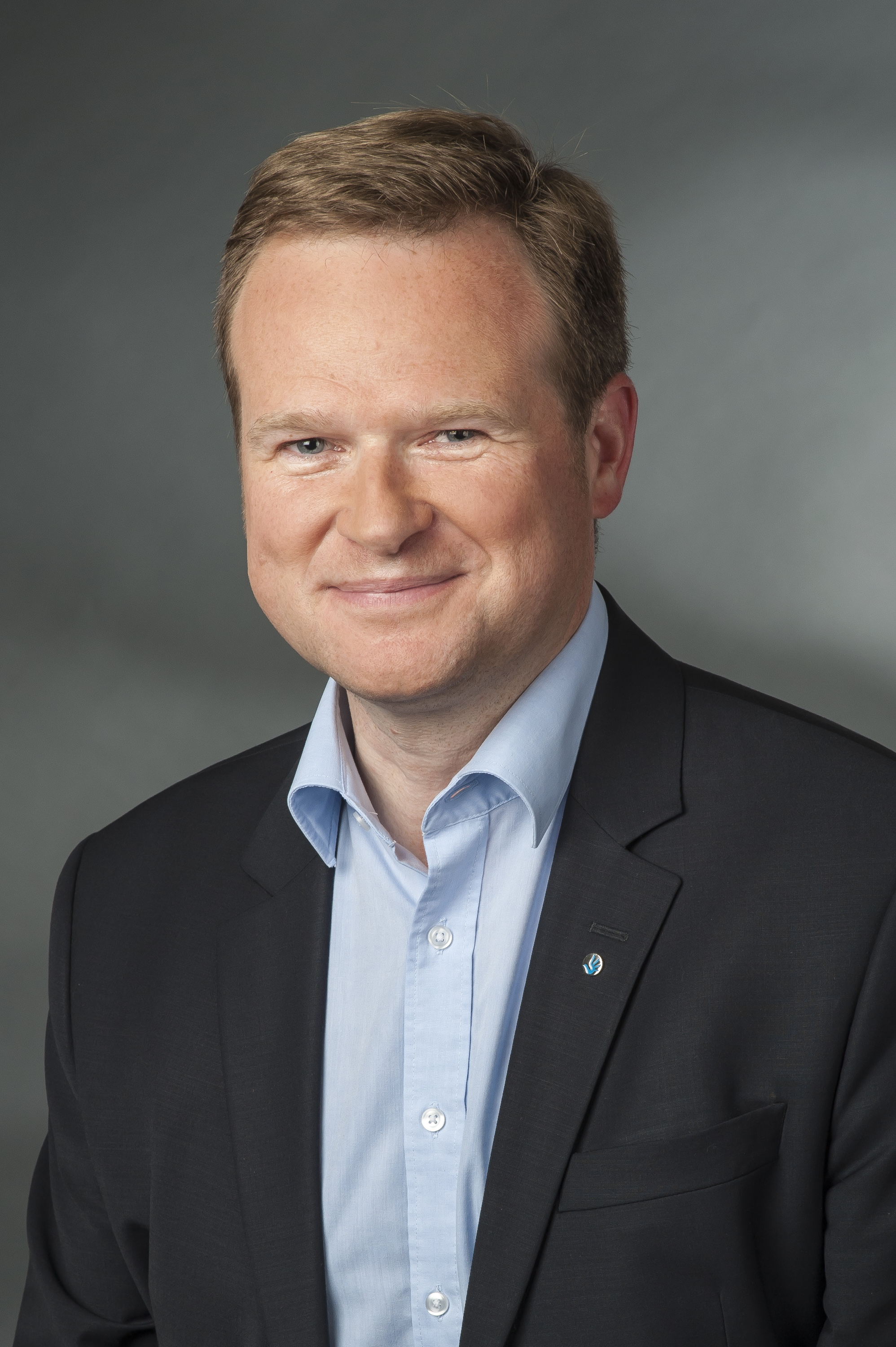 Frank Schwabe (* 12. November 1970 in Waltrop) ist ein deutscher Politiker (SPD) und Mitglied des Deutschen Bundestages.